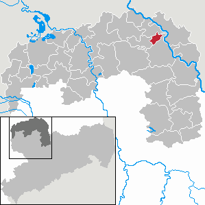 Zinna in Saxony - Landkreis Nordsachsen